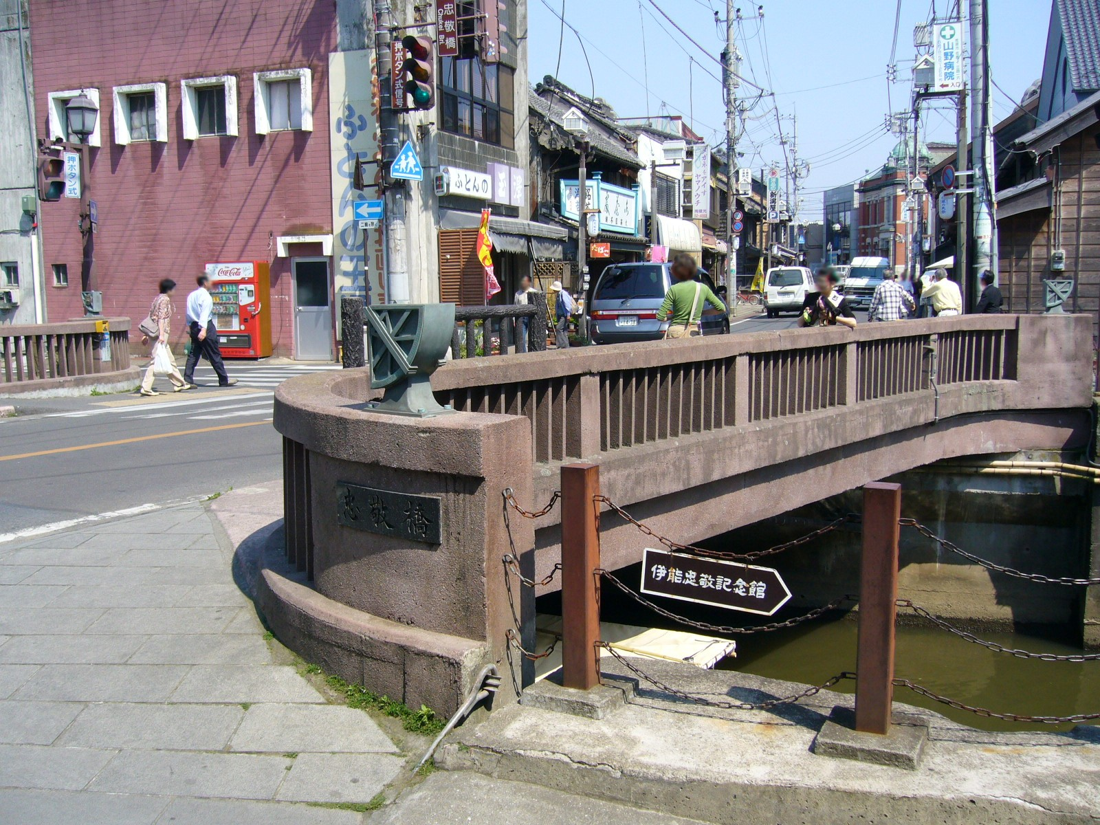 chuukei-bridge2,katori-city,japan